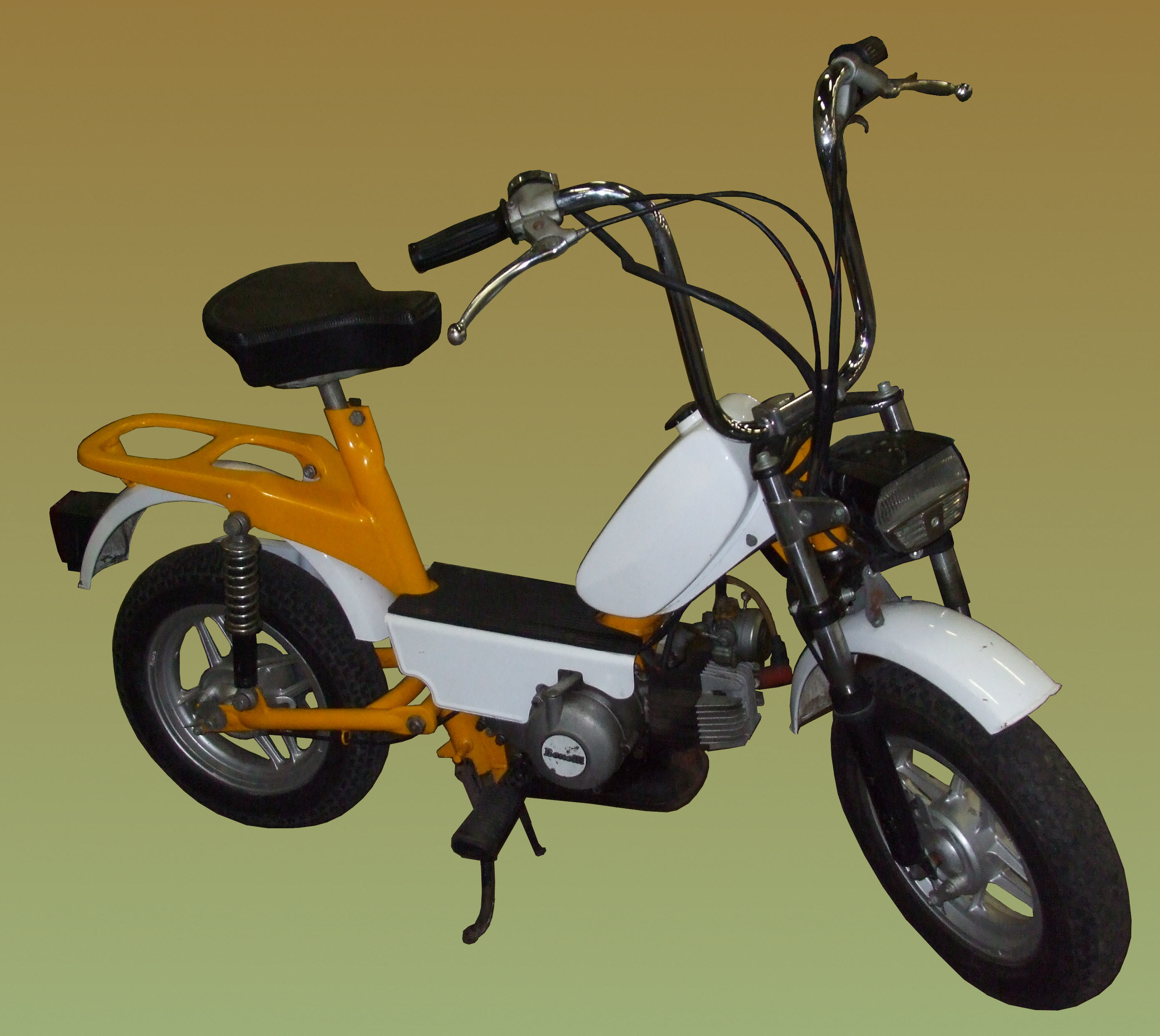 Benelli-Moped, bei der Retro in La Louvière